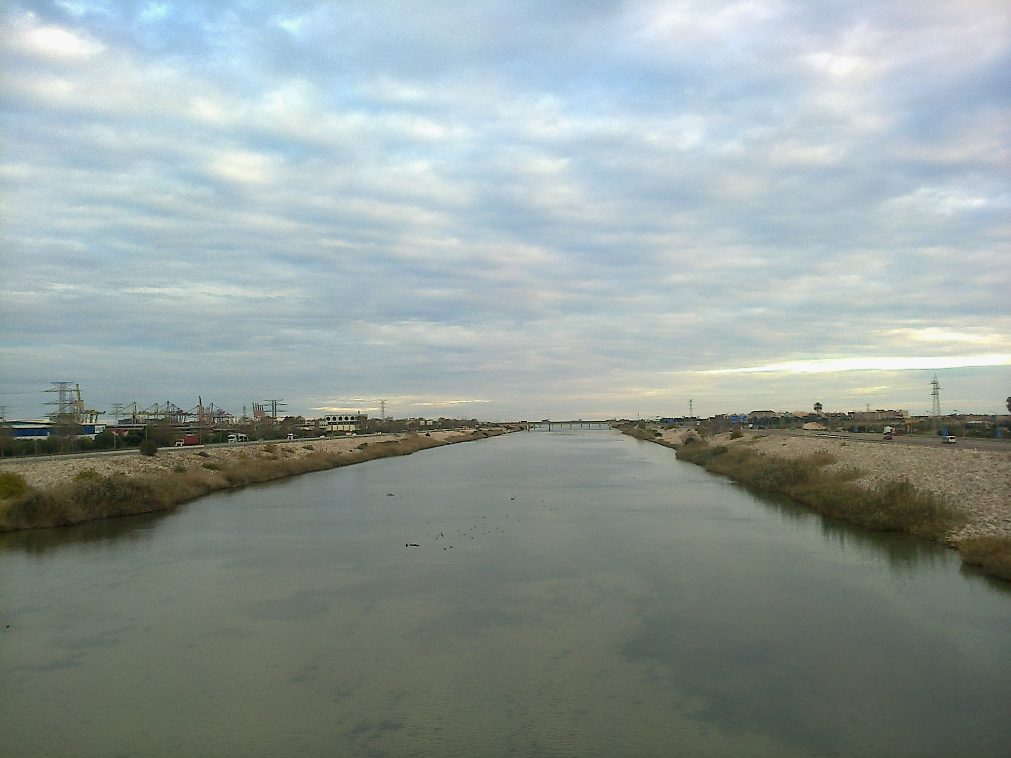 Desembocadora del Turia (Nuevo Cauce) a la altura de Castellar-Oliveral (municipio de Valencia).